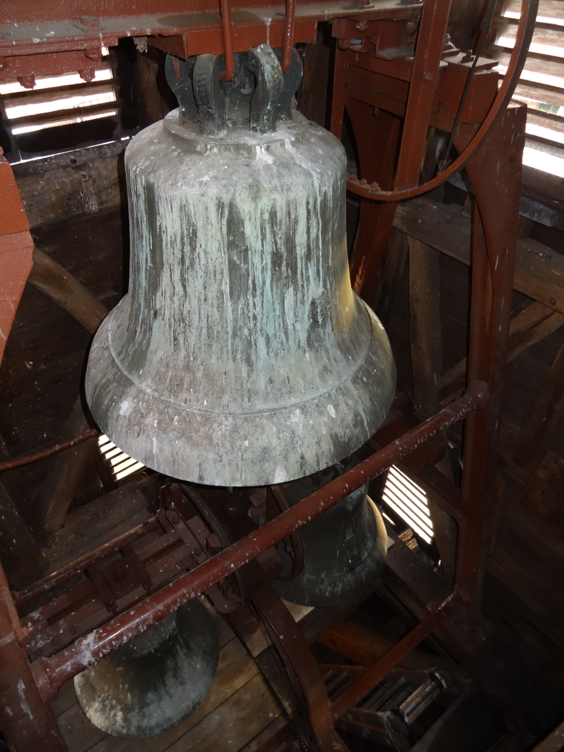 Evangelische Pfarrkirche Langd